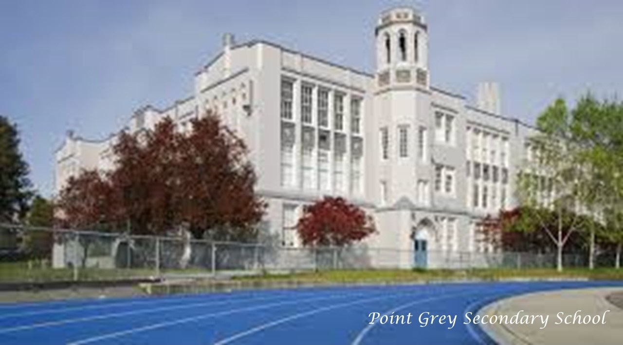 To All The Boys I've Loved Before